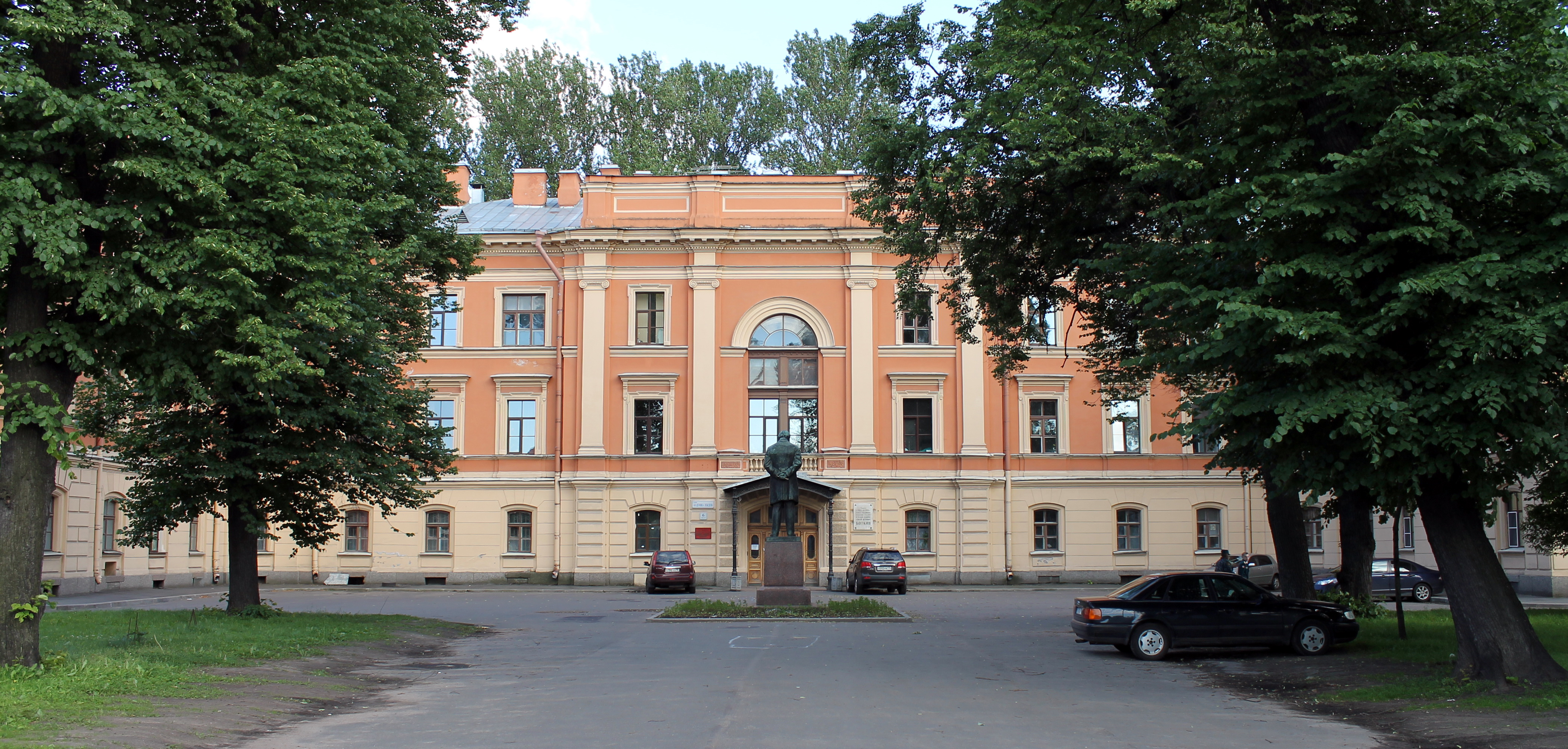 Здание Клиники военно-полевой хирургии ВМА в Санкт-Петербурге